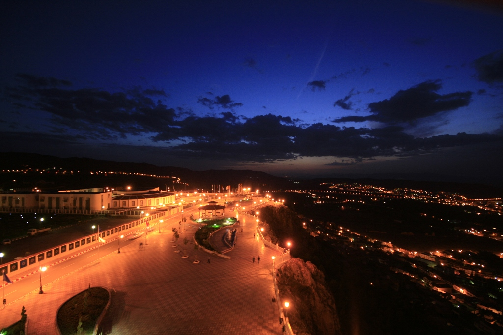 Seen from Lalla Setti - Tlemcen - Algeria